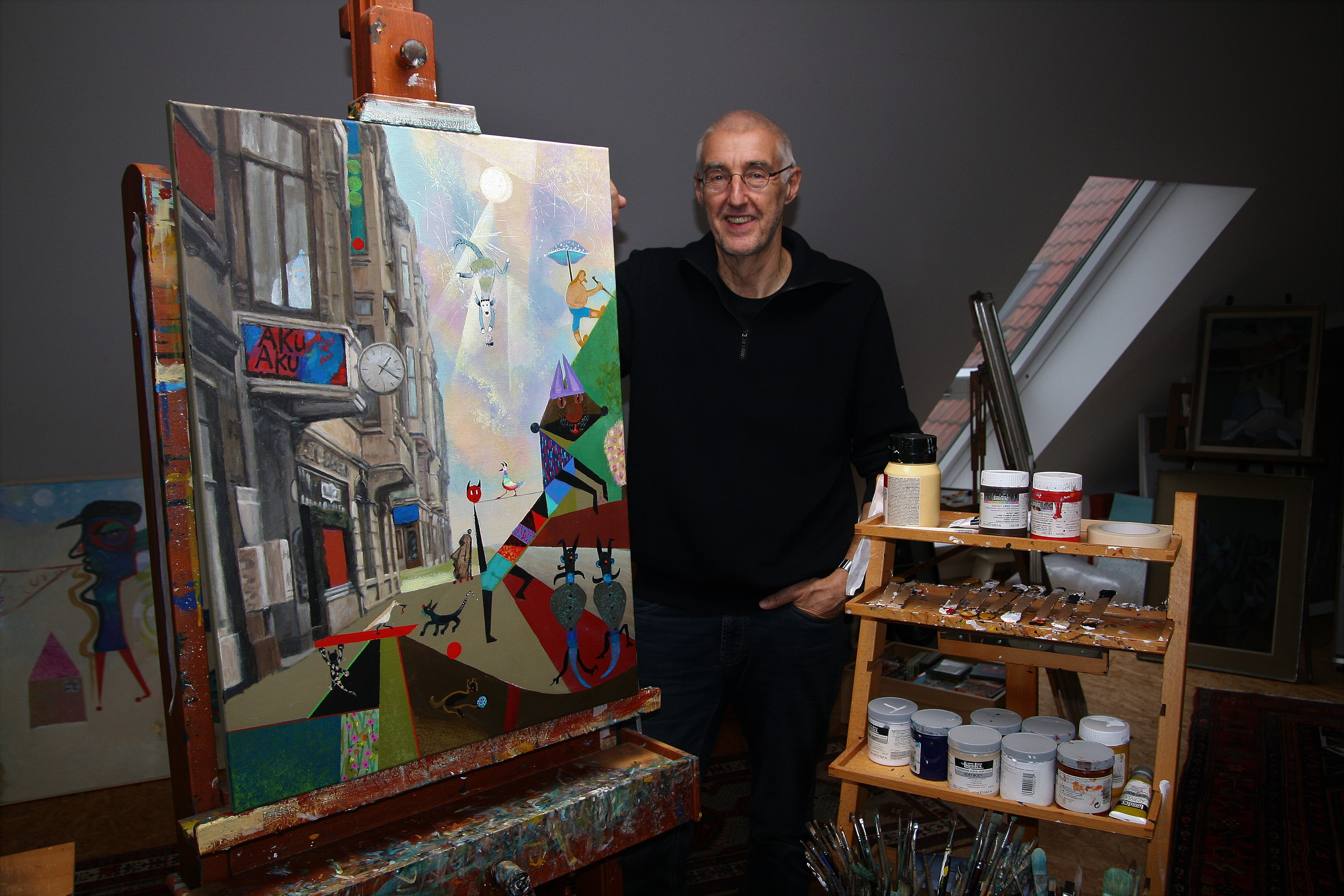 Peter Barthold Schnibbe in seinem Atelier. Auf der Staffelei das Werk "Alte Bürger", eine Gemeinschaftsarbeit mit dem Hamburger Künstler Otto Quirin.